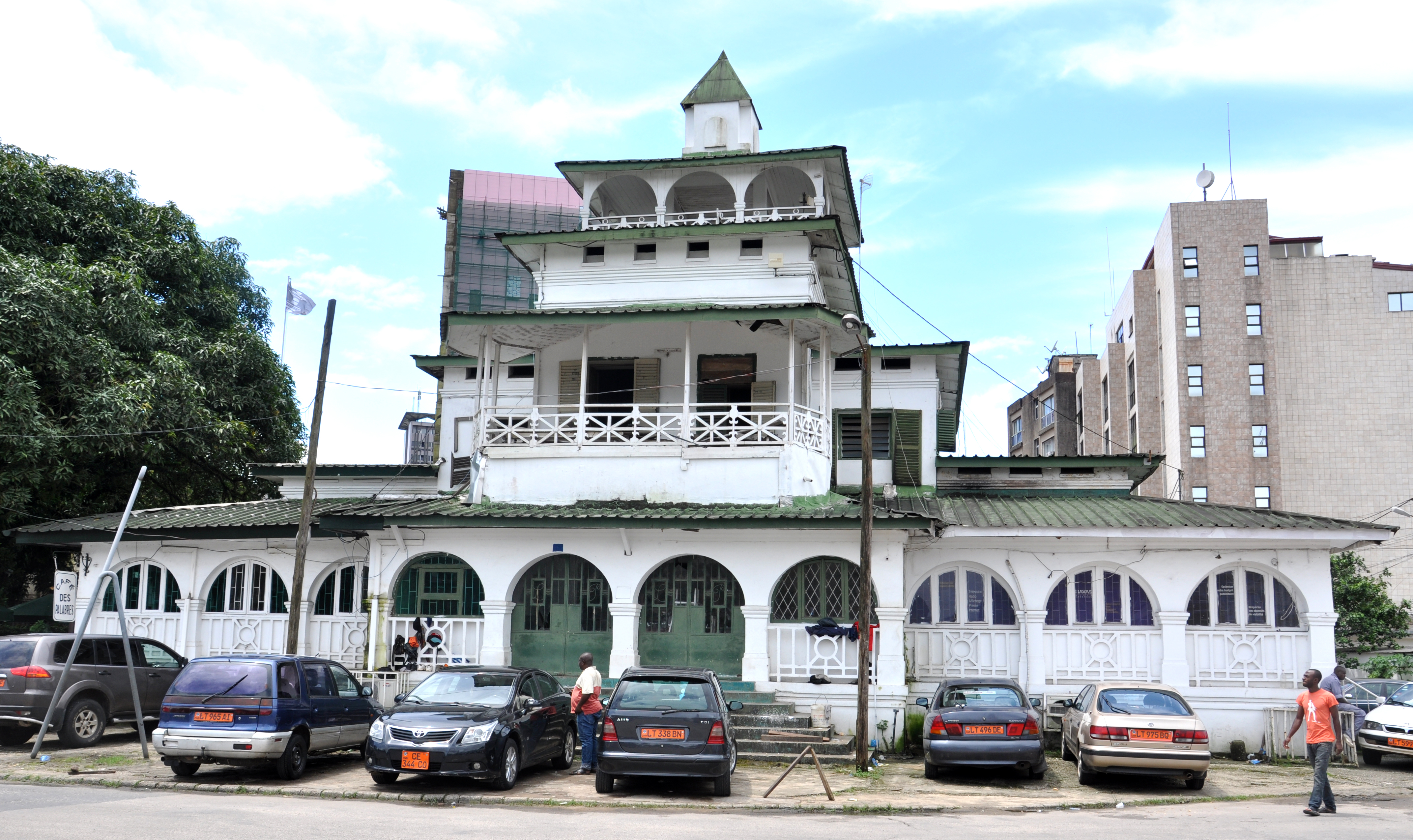 Palais des rois Bell